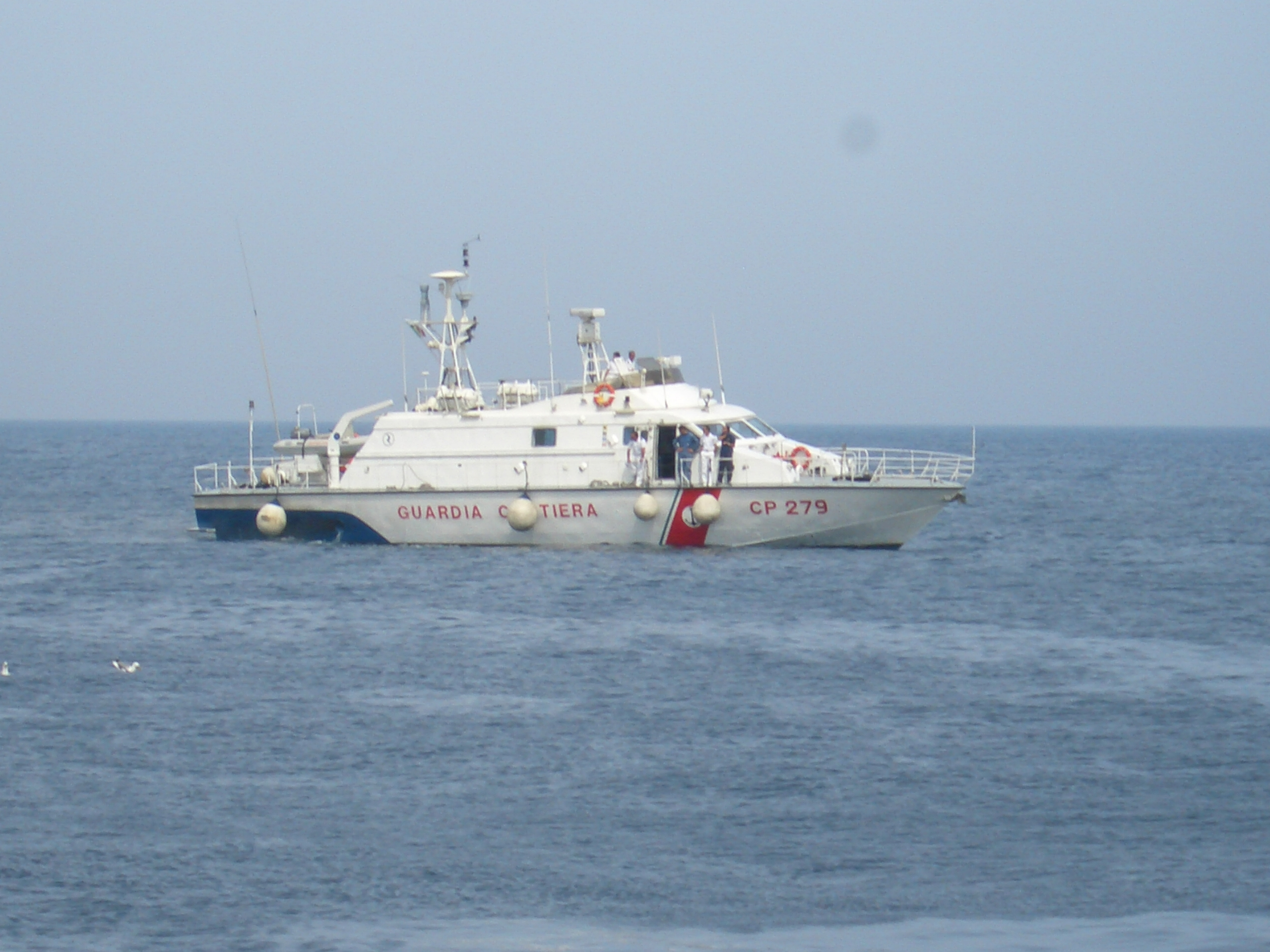 Motovedetta CP Classe 200/S (CP 279)